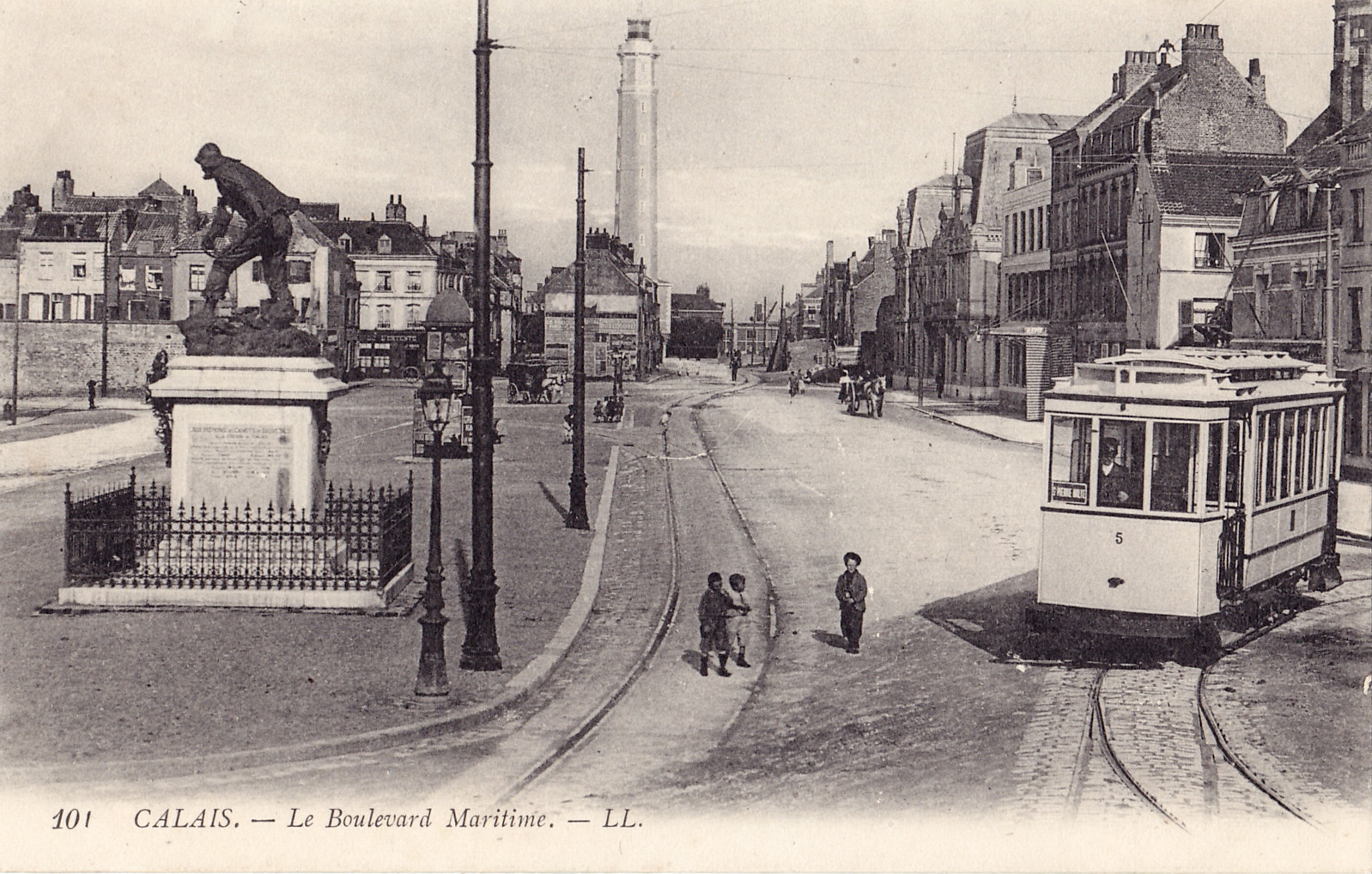 Carte postale ancienne éditée par LL, n°101 :CALAIS - Le Boulevard Maritime. On voit aussi le Monument des Sauveteurs.